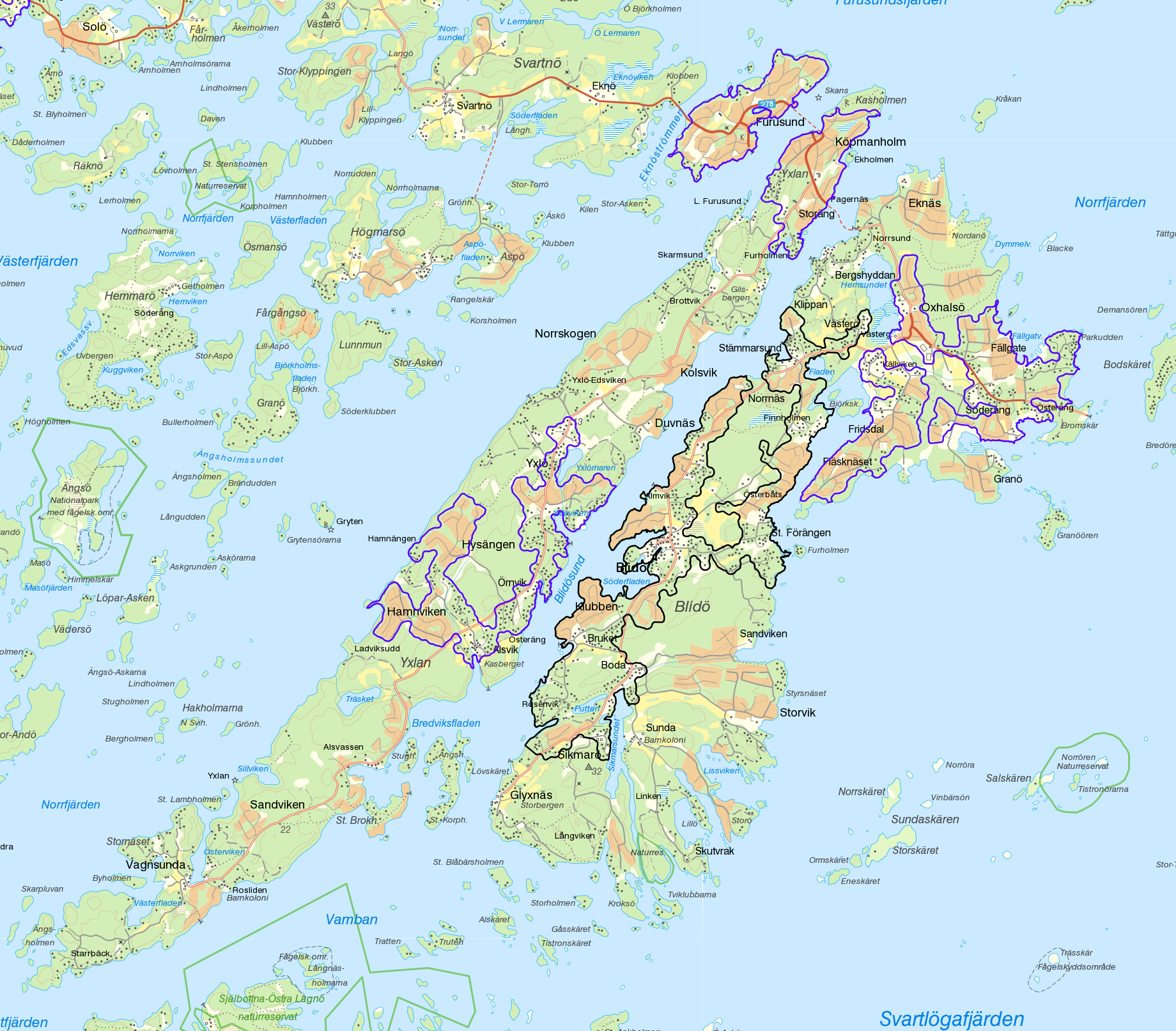 Tätorten Blidö med gränserna från Statistiska centralbyråns tätortsavgränsning 2015 i svart samt småorterna på öarna Blidö och Yxlan med gränserna från småortsavgränsningen 2015 i lila. Bakgrundskarta från Lantmäteriet, skala 1:30 236.